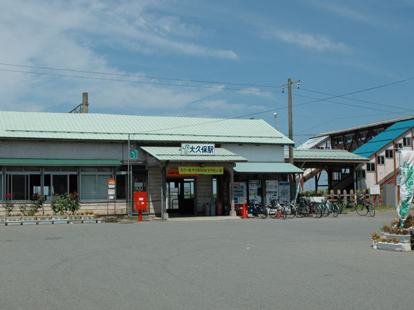 羽越本線･大久保駅